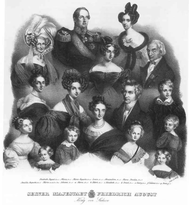 oben: Friedrich August II. and seine Frau Maria von Bayern 2. Reihe von oben: Prinzessin Maria Augusta, Luise von Etrurien, Prinz Maximilian 3. Reihe: Amalia (Amalie Heiter), Amalia Augusta von Bayern, Prinzessin Maria Ferdinanda, Prinz Johann und Prinz Albert als Kind Im Vordergrund: Prinzesson Maria, Anna Maria, Prinz Georg, Prinzessin Elisabeth, Prinzessin Sidonie und Prinz Ernst (Kinder von König Johann)